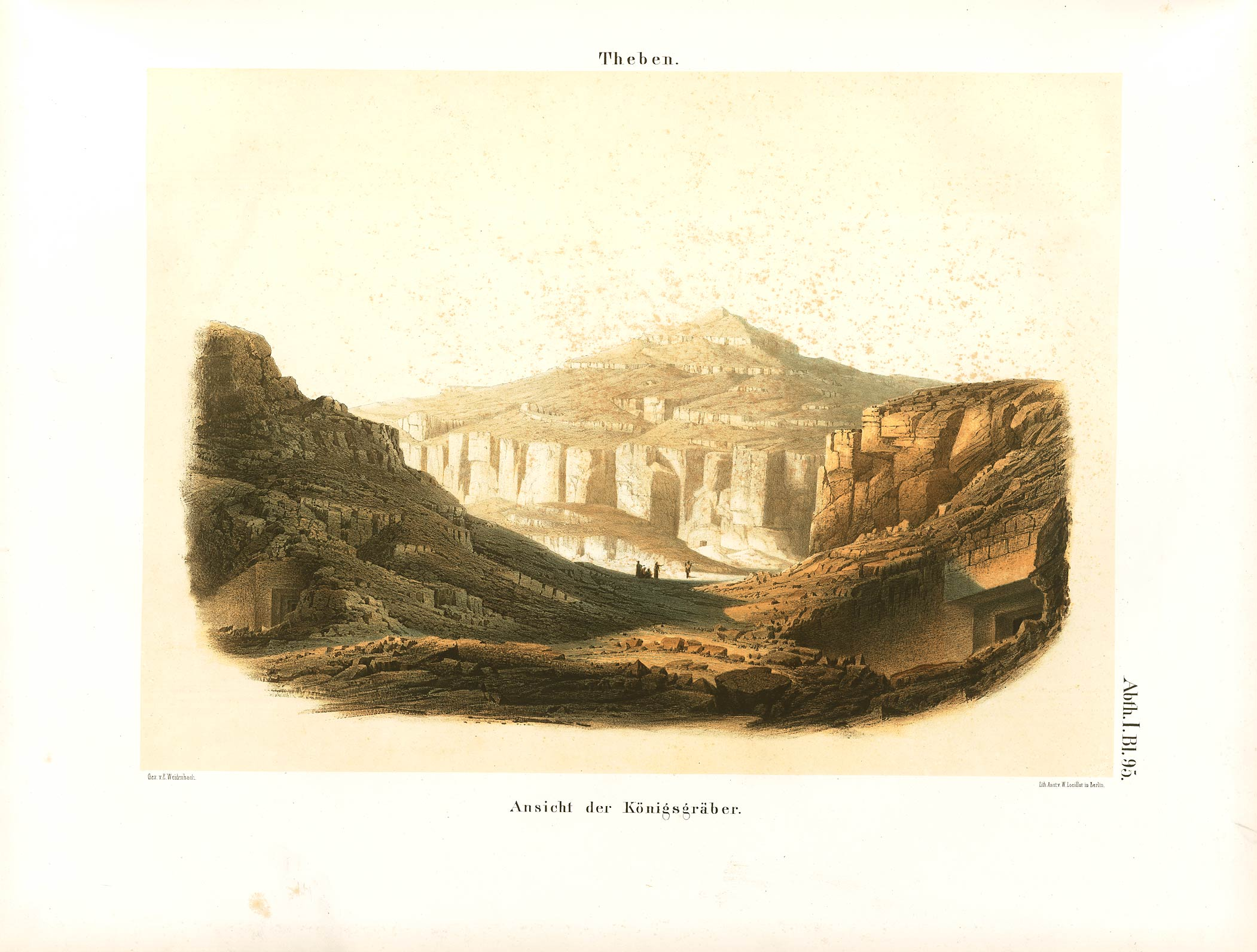 Denkmaeler aus Aegypten und Aethiopien nach den Zeichnungen der von Seiner Majestät dem Koenige von Preussen, Friedrich Wilhelm IV., nach diesen Ländern gesendeten, und in den Jahren 1842–1845 ausgeführten wissenschaftlichen Expedition auf Befehl Seiner Majestät